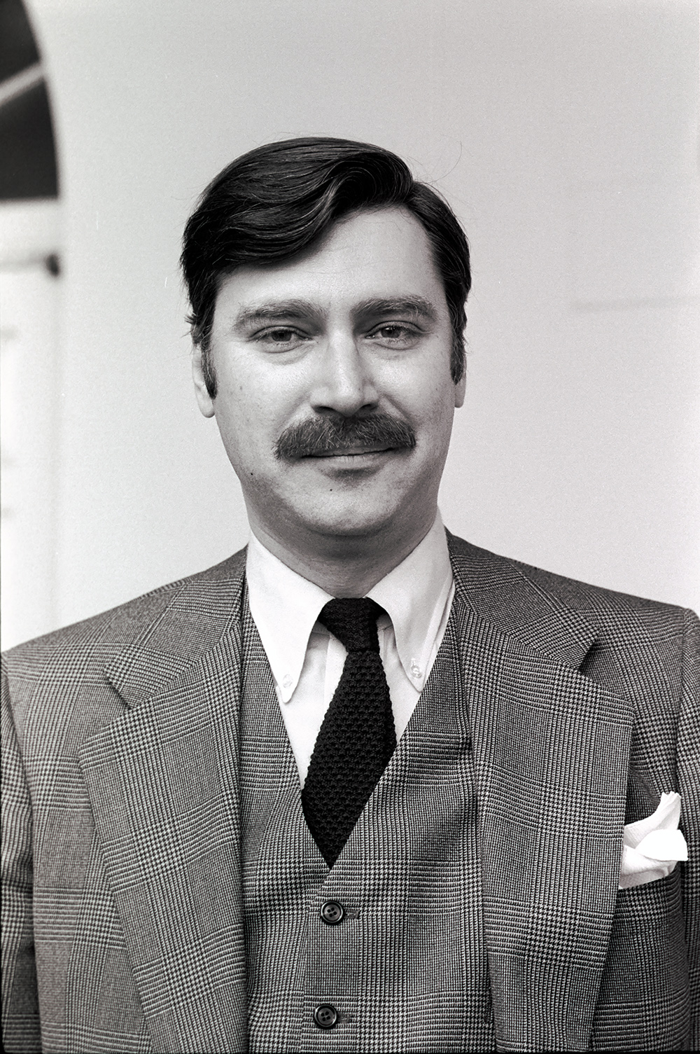 Aram Bakshian in 1981